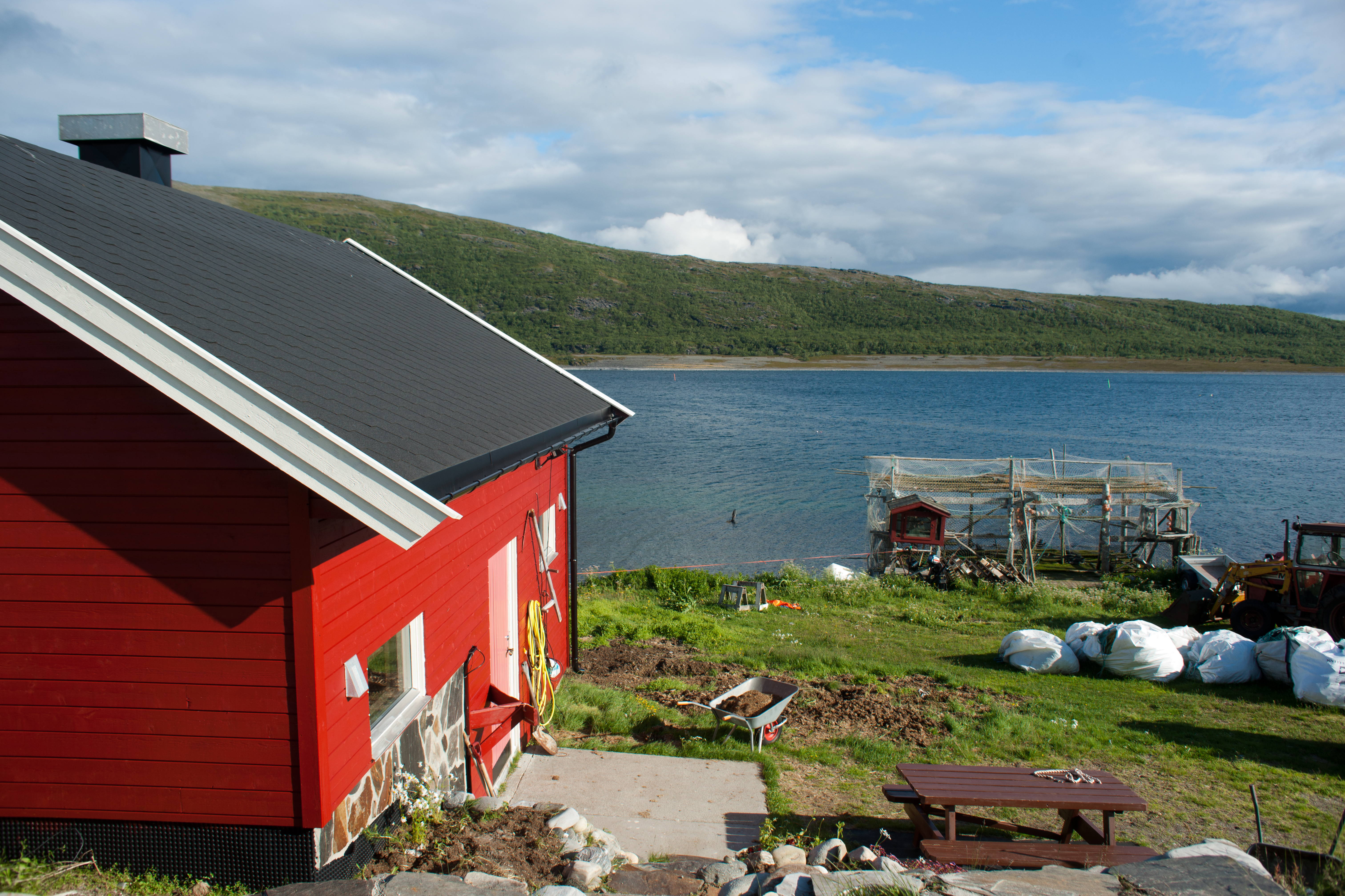 Kistrand, Porsanger, Norway.